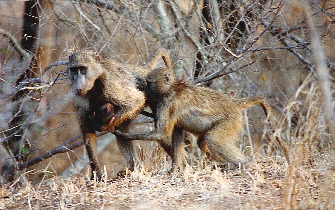 Monkey am Krügerpark